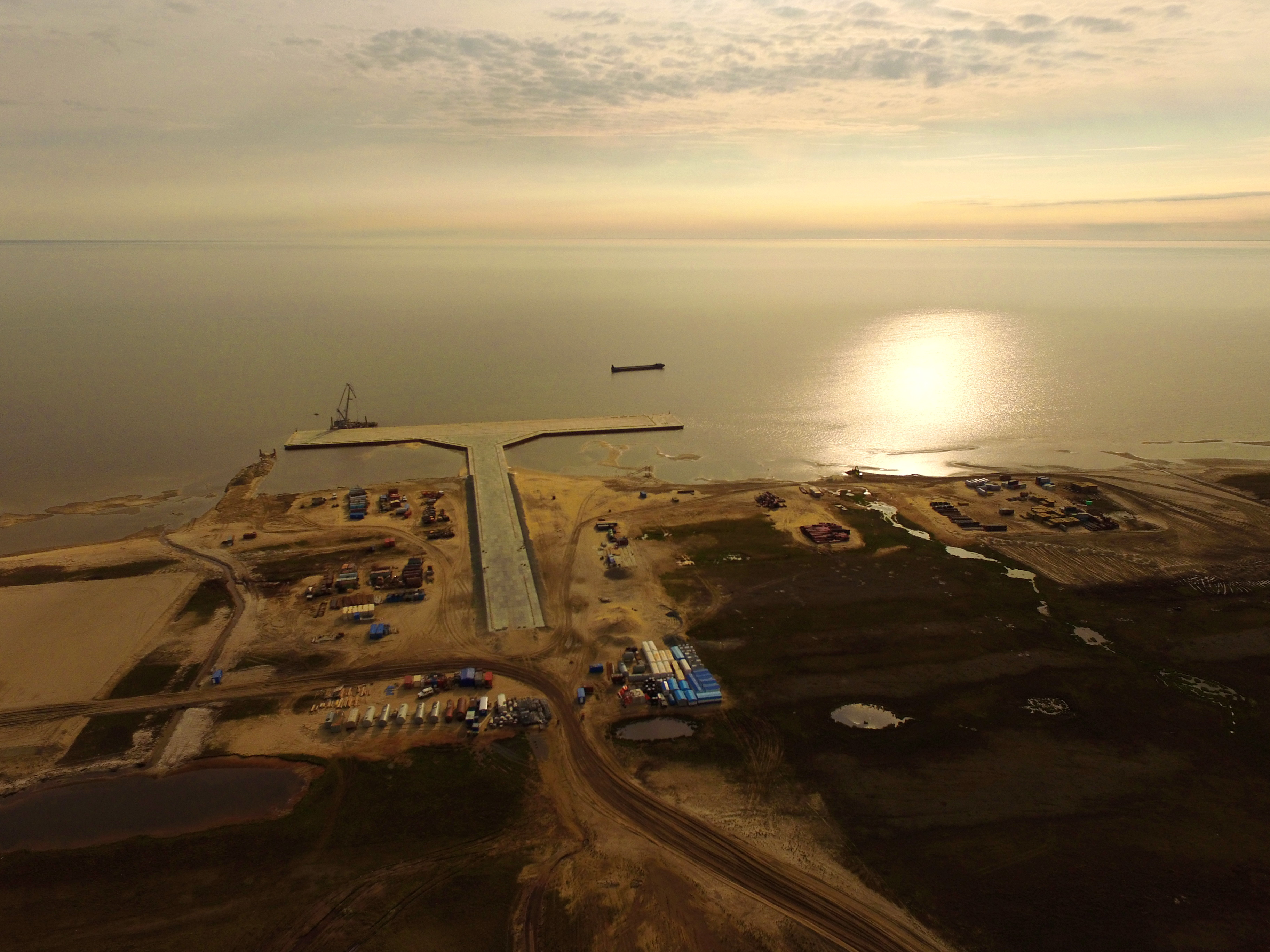 Причал Салмановского ГКМ, Обская губа.